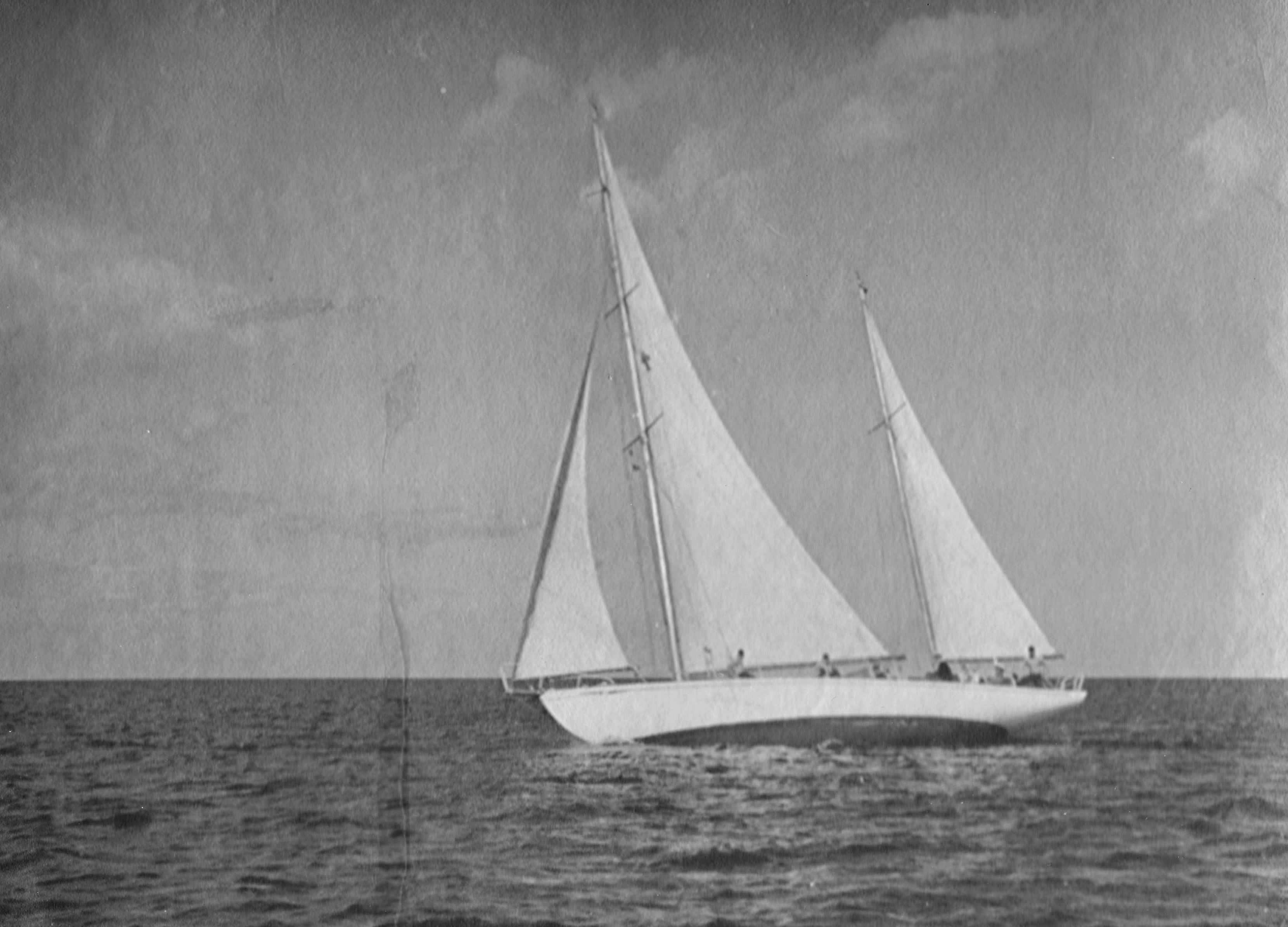 S/Y Gathenhielm, med scoutlilja i seglen. Foto cirka 1960.